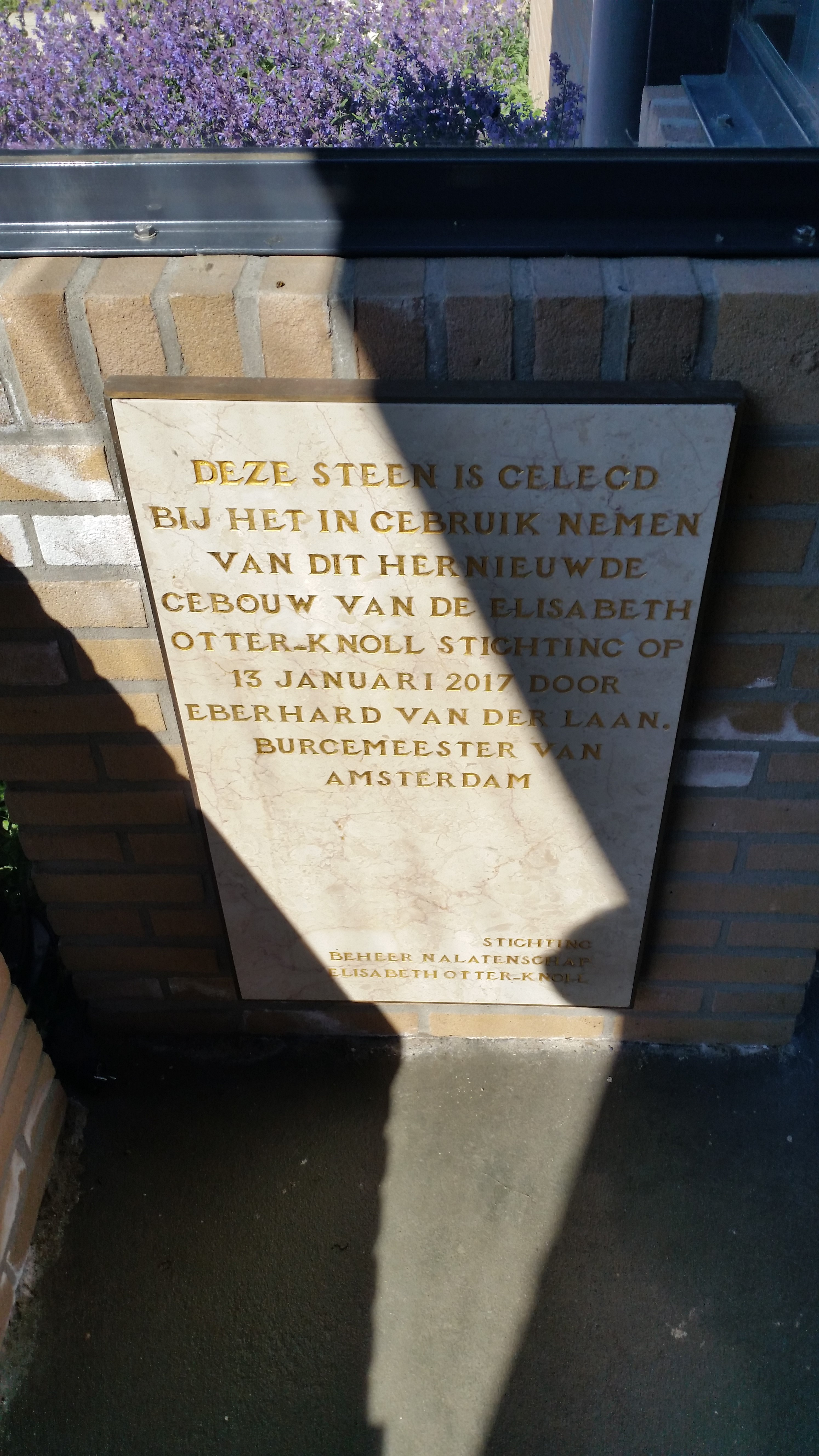 Steen ter gelegenheid vernieuwd EOKS door Eberhard van der Laan in 2017, Loowaard 3, Amsterdam